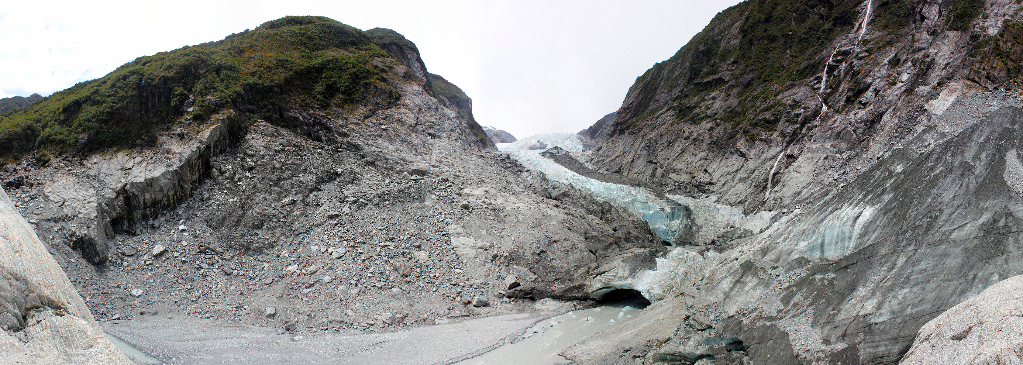 Gletscherzunge des Franz Josef Gletscher